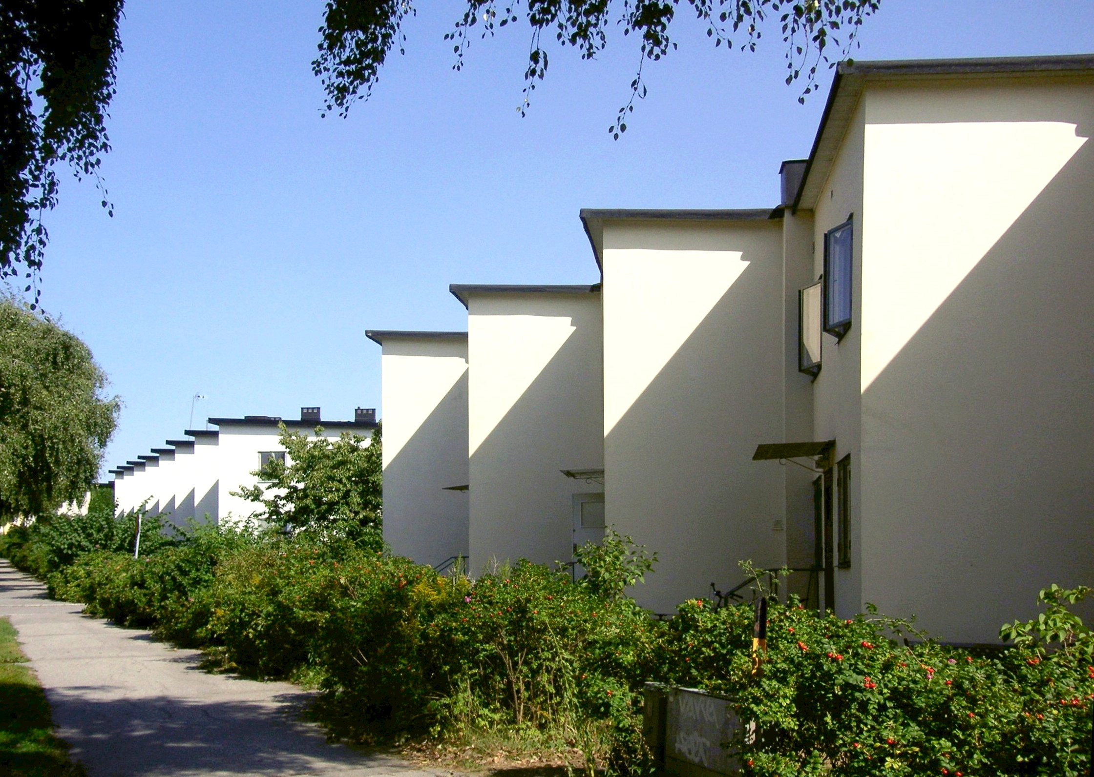 Stadsdelen Ålsten